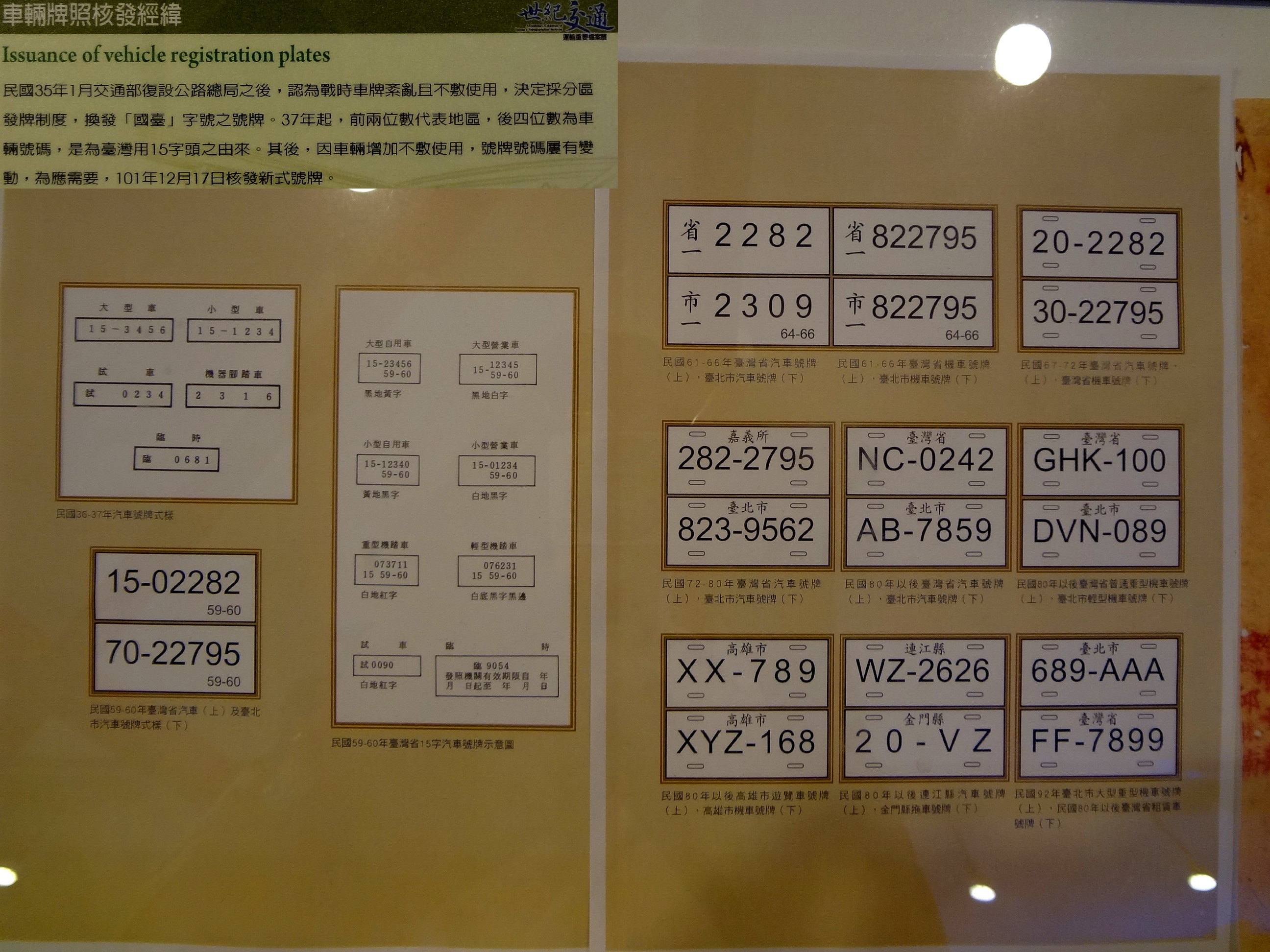 中華民國車輛號牌核發經緯，2013年10月15日國立國父紀念館展示。內容部分有誤，例如第四代機車號牌編號僅有五碼而非六碼。